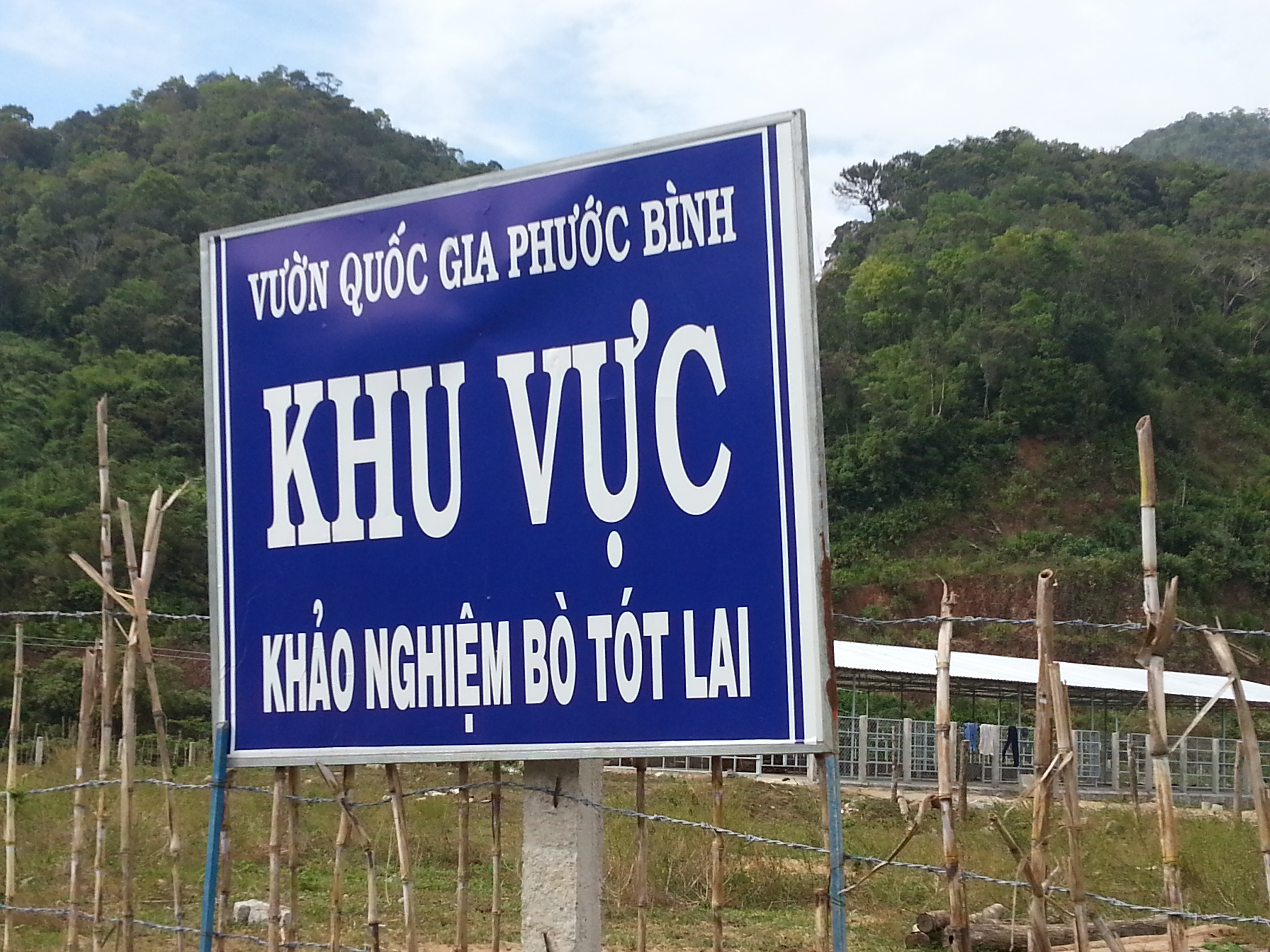 Phước Bình, Bác Ái, Ninh Thuận, Vietnam